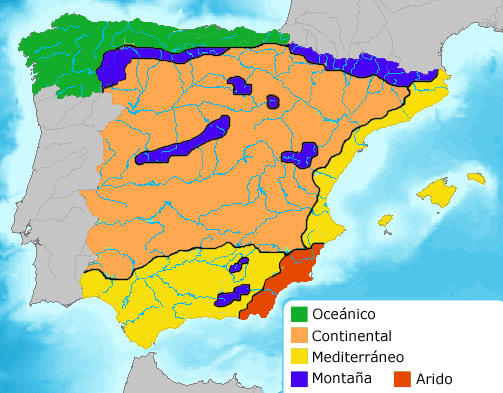 Climas en España / Spanish climate areas